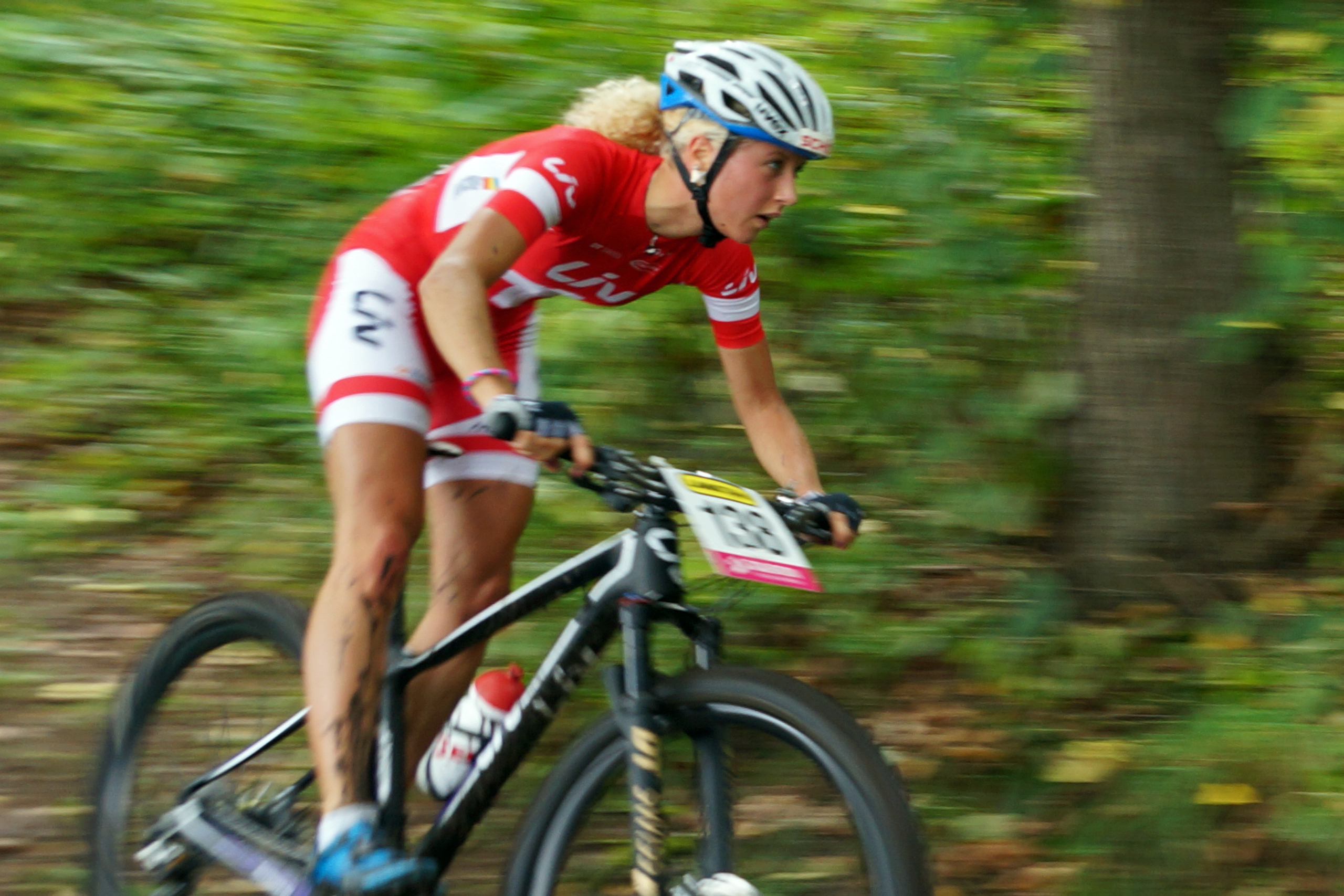 Jolanda Neff - szwajcarska kolarka górska - na trasie wyścigu MTB w Jeleniej Górze